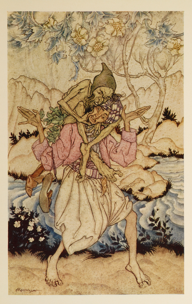 Illustration from "The Story of Sindbad the Sailor"